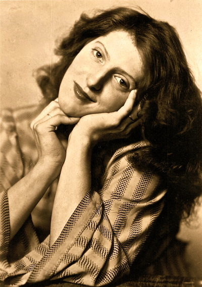 Eva Schnell